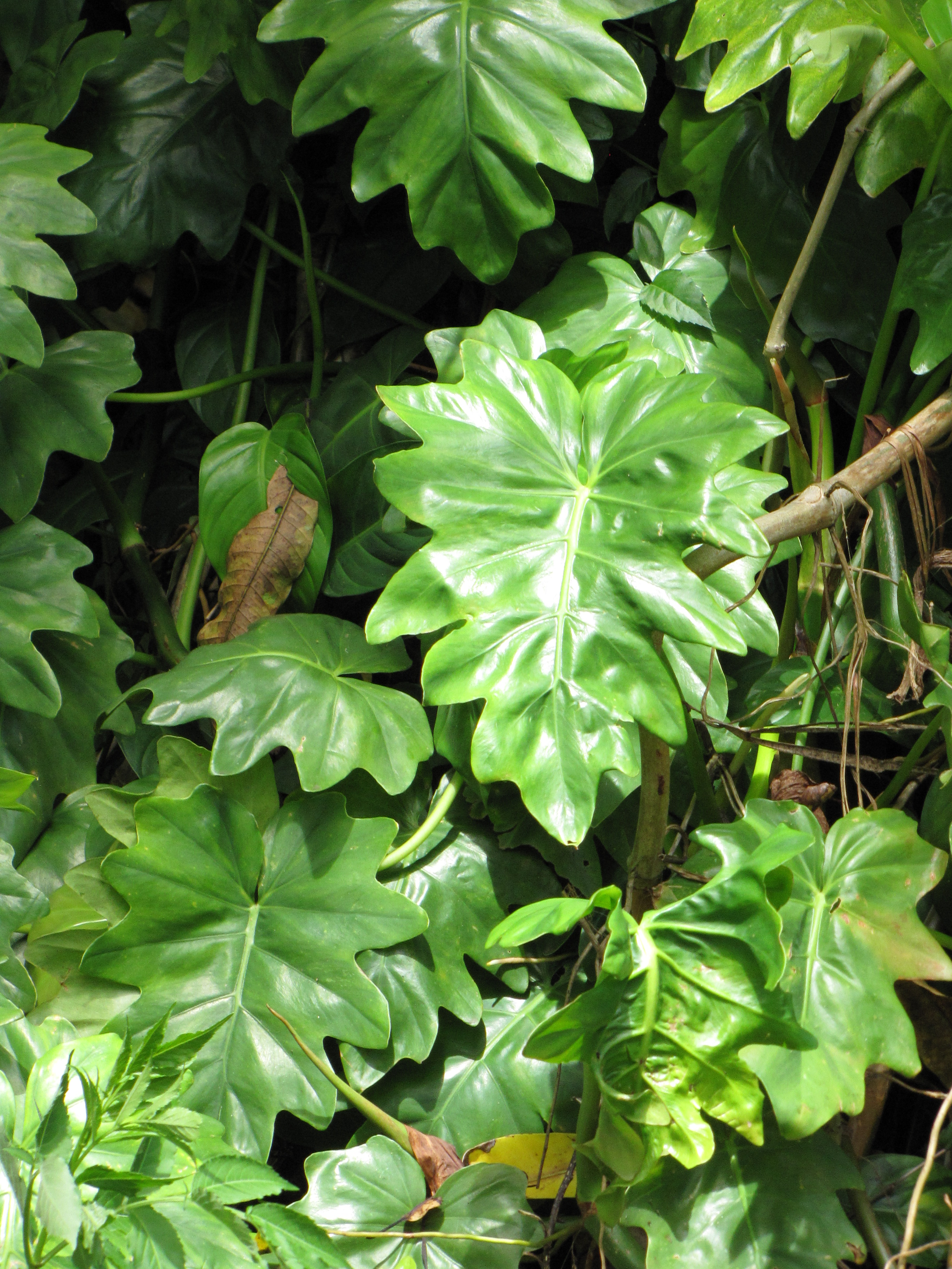 Philodendron lacerum Leaves at Nahiku, Maui.